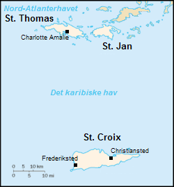 Norwegian: Kart over Dansk Vestindia, english: Map over Danish West Indies